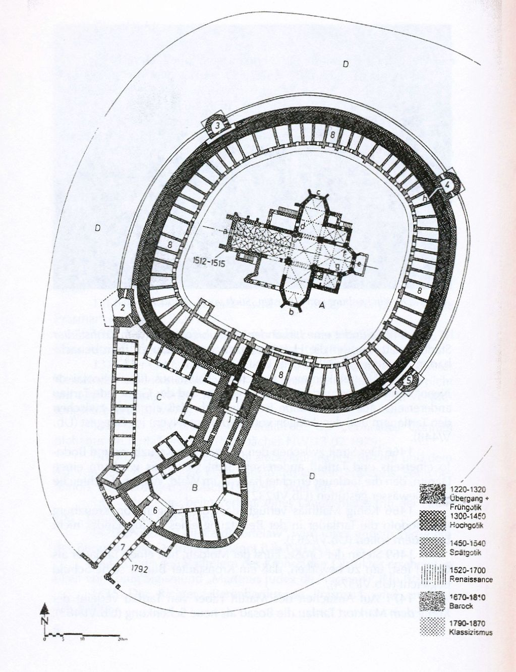 Planul ansamblului fortificat de la Prejmer